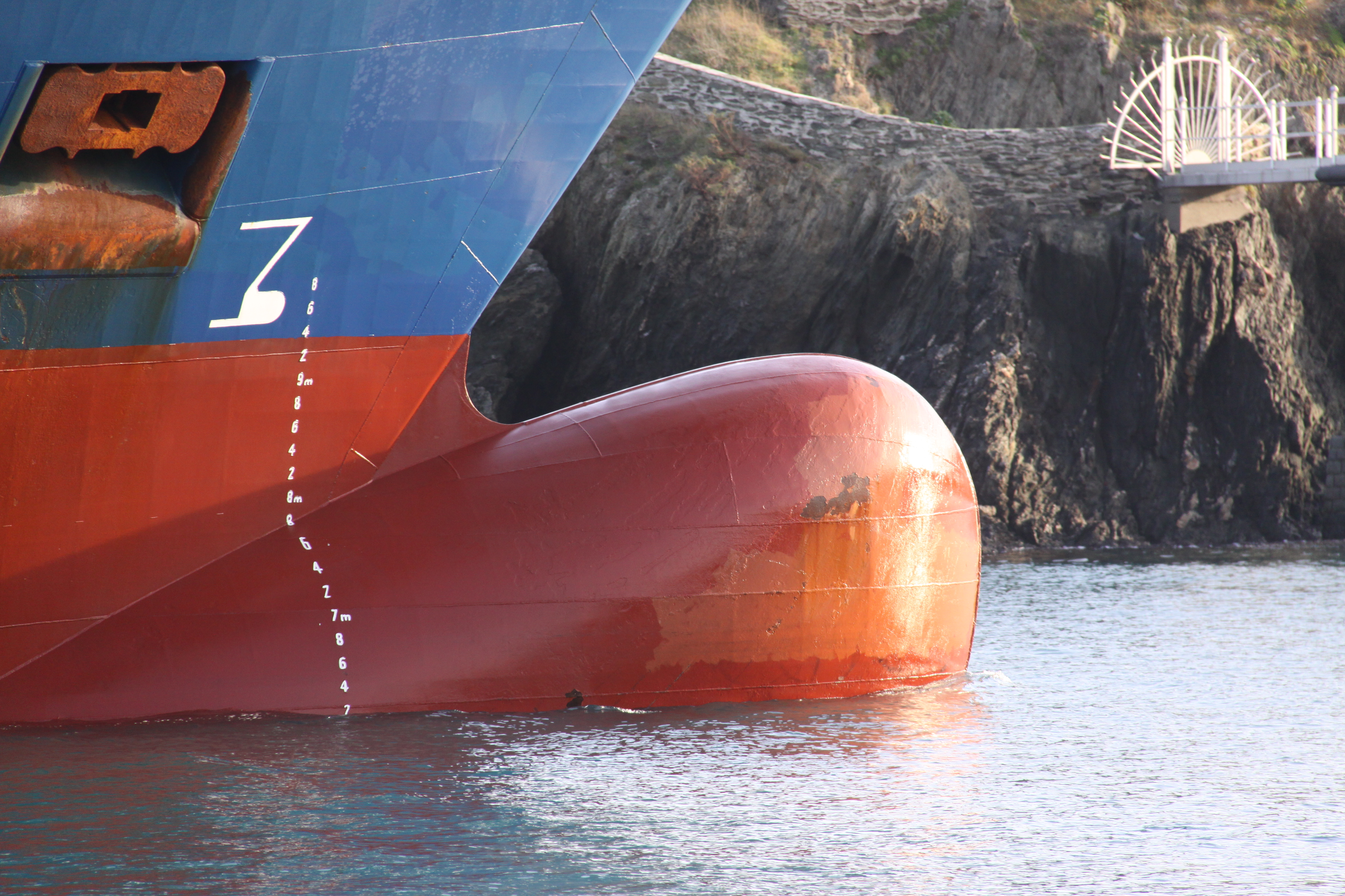 Le bulbe d' étrave du CMA CGM Casablanca. Le cargo CMA CGM Casablanca est ici en train d' entrer dans le port de Port-Vendres. Ce navire de charge, un porte-conteneurs réfrigérés, a été construit en 2005. Il mesure 134 mètres de long et 22 de large. tonnage du navire: 11209 t. Il bat pavillon du Royaume-Uni (UK). IMO 9326964. Il vient décharger des conteneurs réfrigérés de fruits et légumes. Port-Vendres, Pyrénées-Orientales, France.